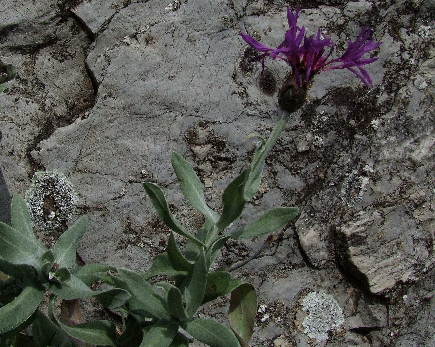 Centaurea triumfettii